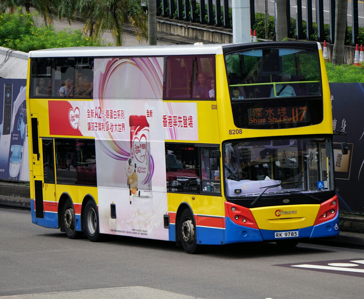 中文（香港）: 過海隧道巴士117線，剛駛出紅磡海底隧道